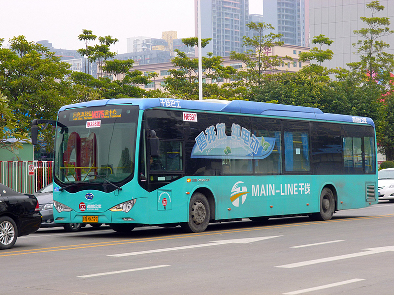 中文（中国大陆）: 深圳公交M375路K9（比亚迪客车CK6120LGEV）